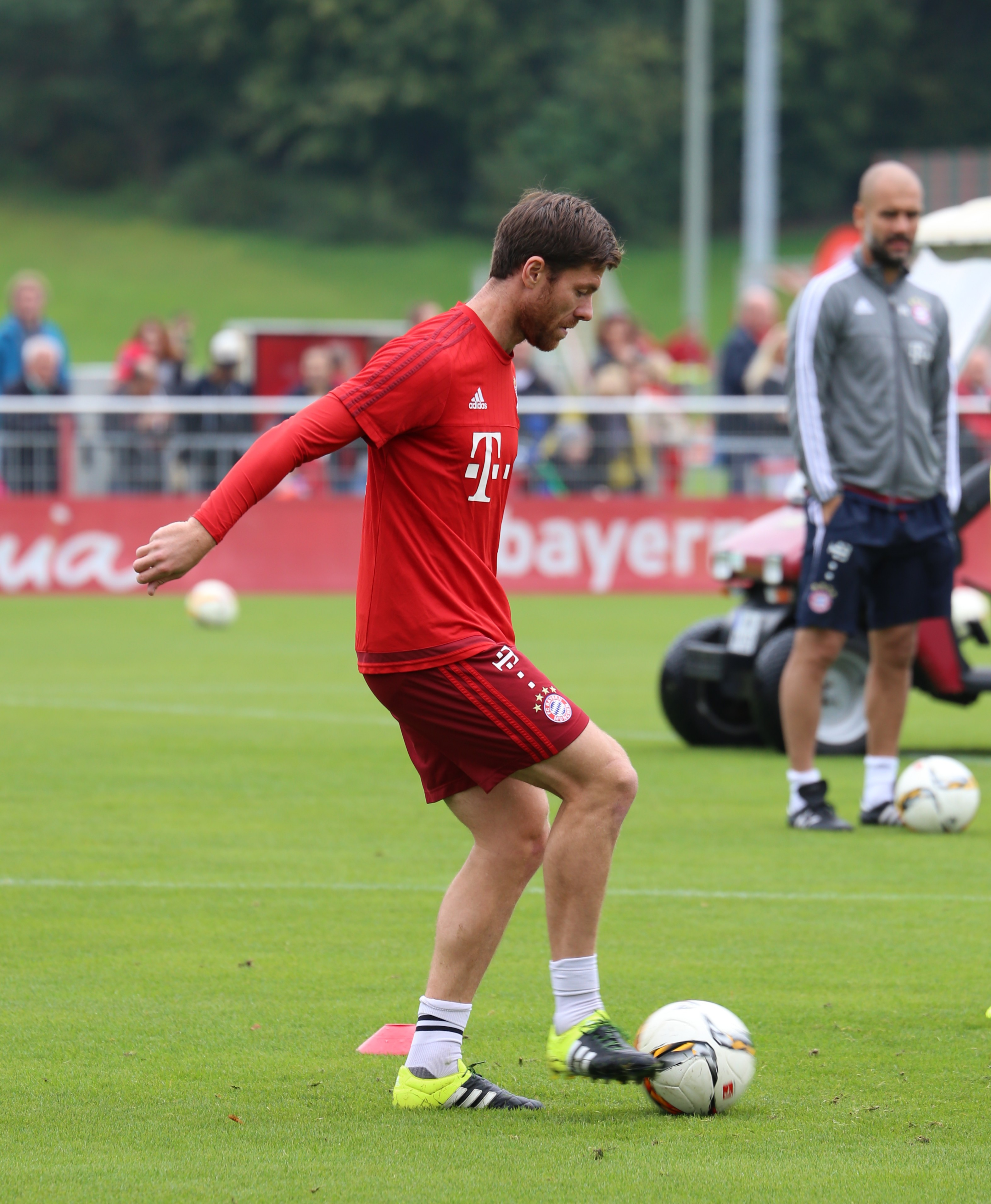 Xabi Alonso beim Training auf dem Gelände des FC Bayern München